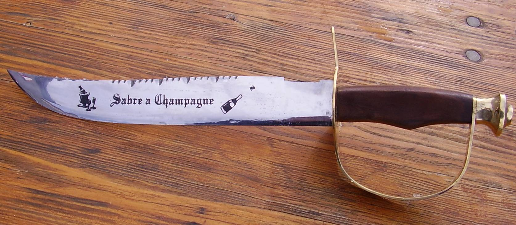 Champagnersäbel auf einem Holztisch